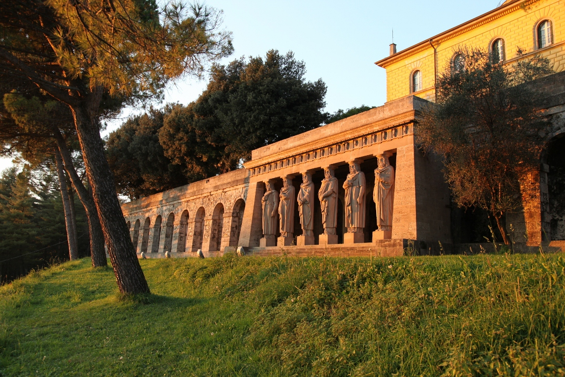 Inverigo 11/2010